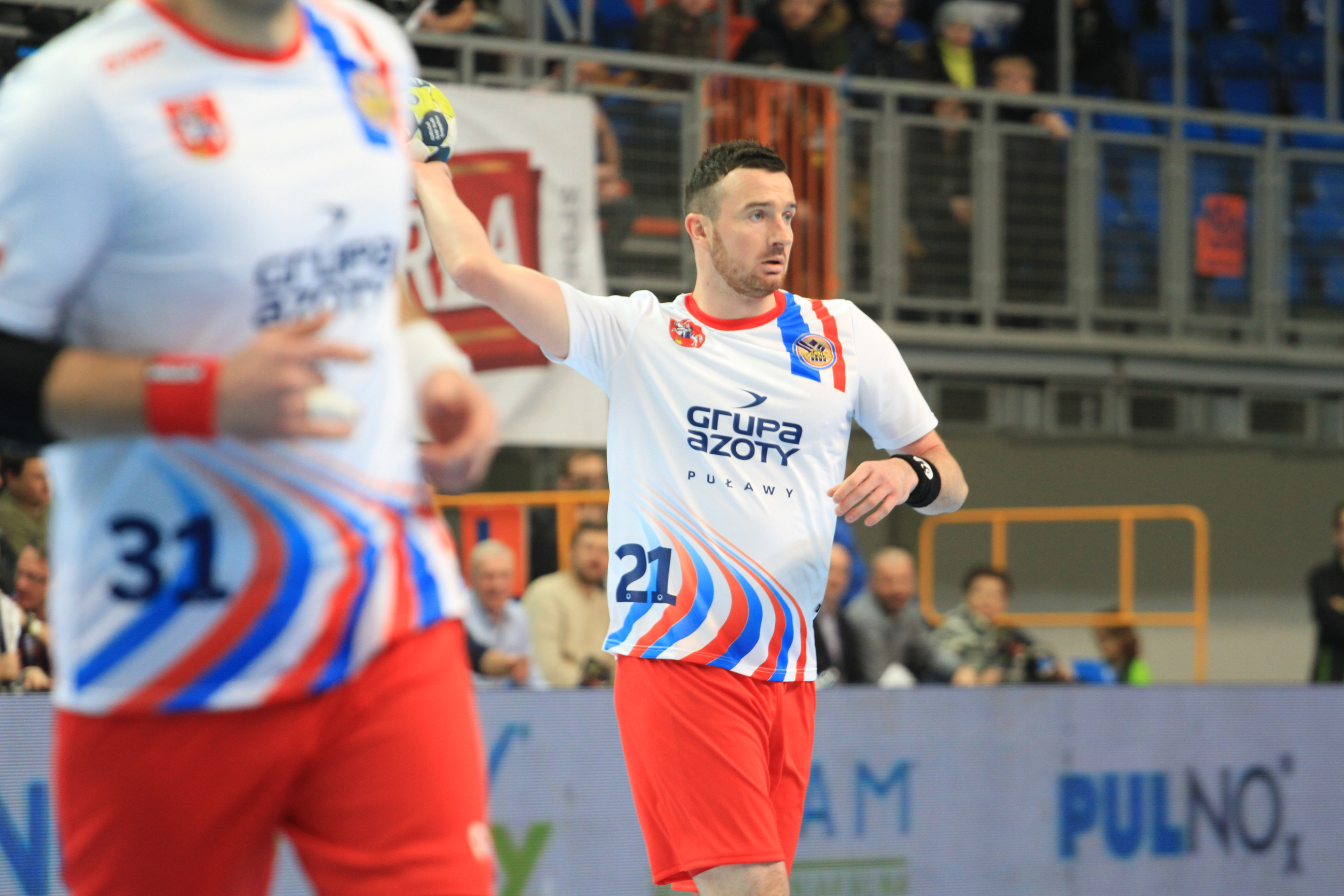 Były reprezentant Polski prowadził zespół do wszystkich 4 brązowych medali Mistrzostw Polski